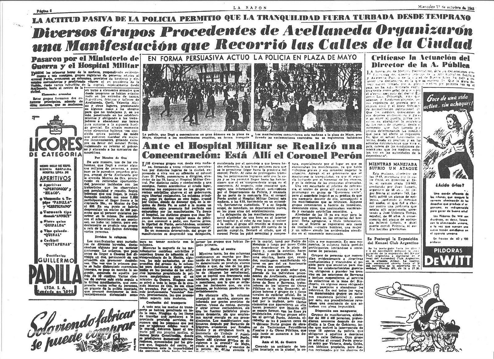 Nota del diario argentino La Razón que da cuenta de la manifestación del 17 de octubre de 1945.